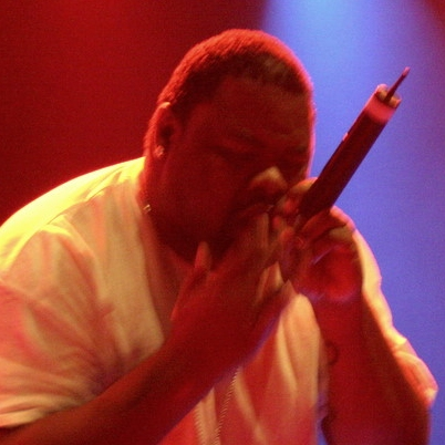 Biz Markie performing in Amager Bio, Denmark.